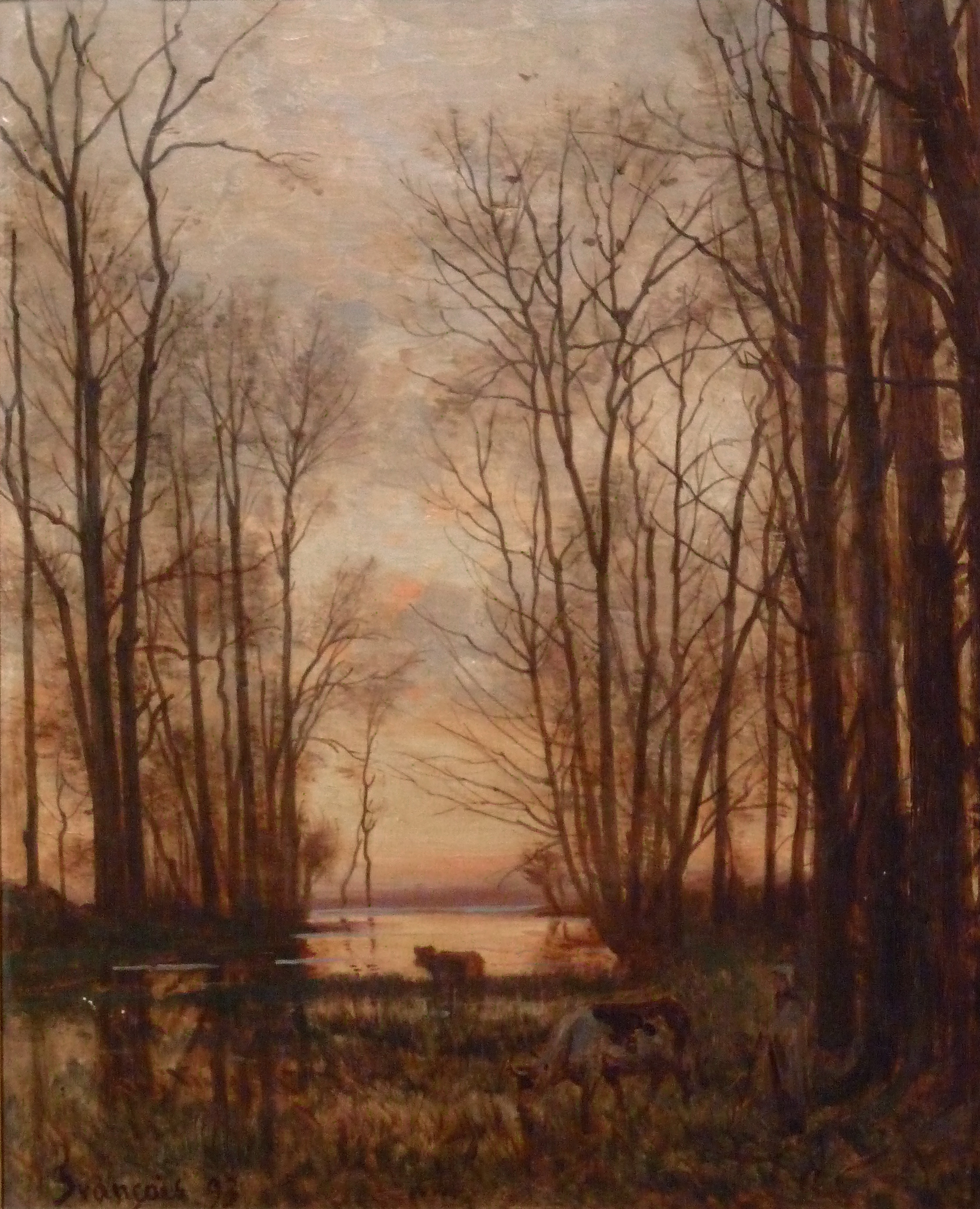 Louis